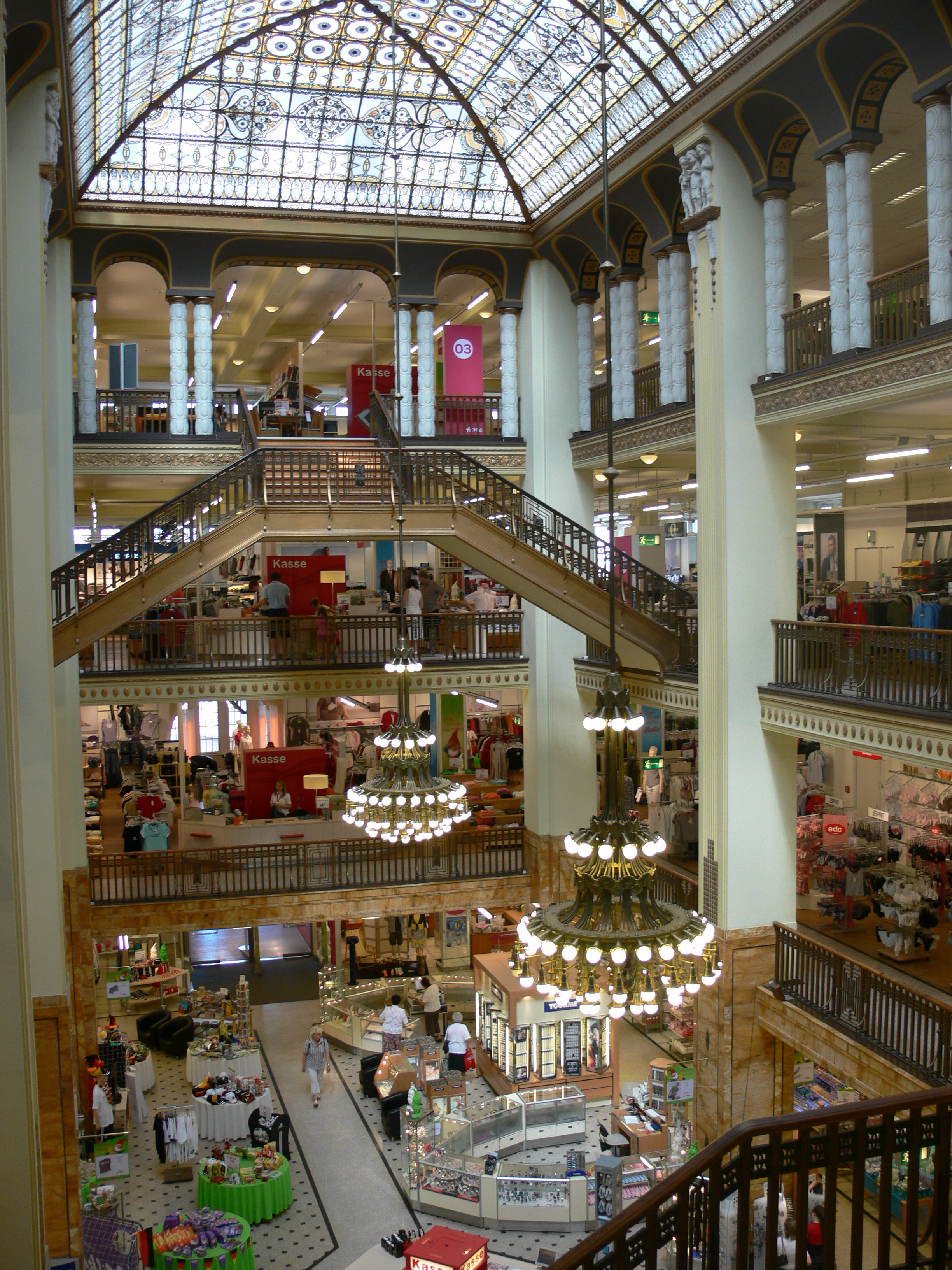 Jugendstilkaufhaus Görlitz